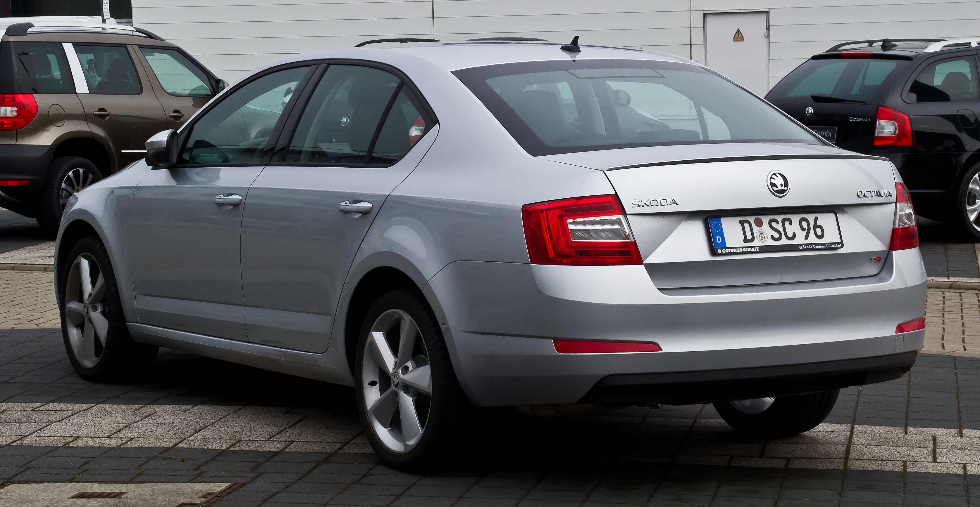 Skoda Octavia 1.8 TSI Green tec Elegance (III)